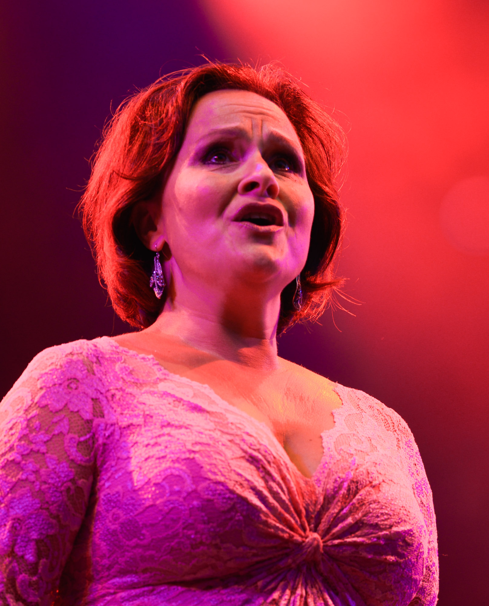 Katarina Dalayman på Gustav Adolfs torg under Stockholms Kulturfestival 2014.